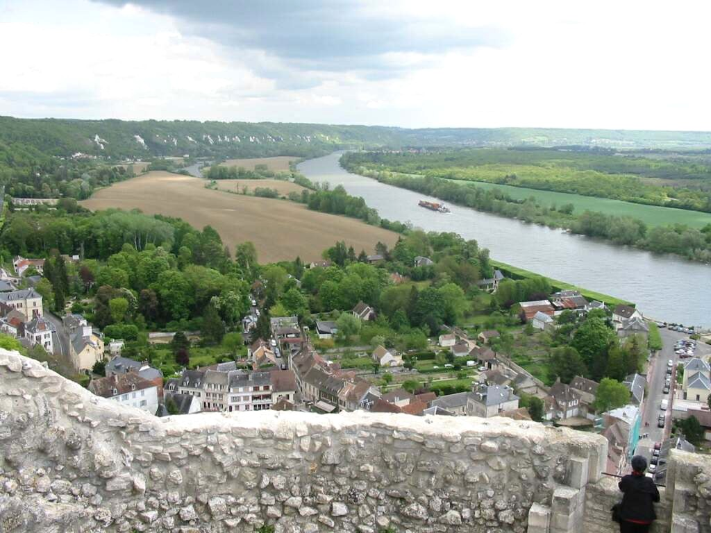 La Roche-Guyon, Val-d'Oise (France) - la vallée de la Seine, vue du donjon vers Vétheuil